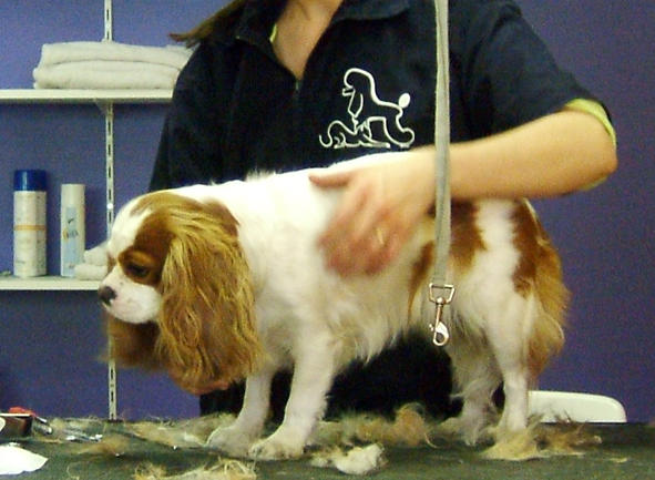 Toilettage Cavalier King Charles